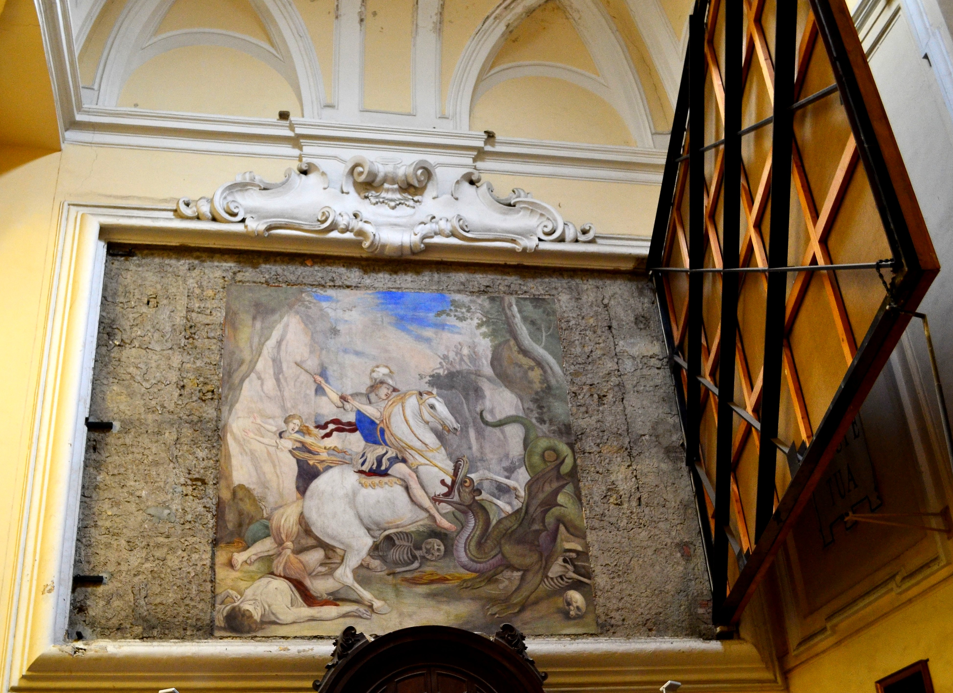 San Giorgio che uccide il drago Aniello Falcone (prima metà Seicento) - Chiesa di San Giorgio Maggiore di Napoli